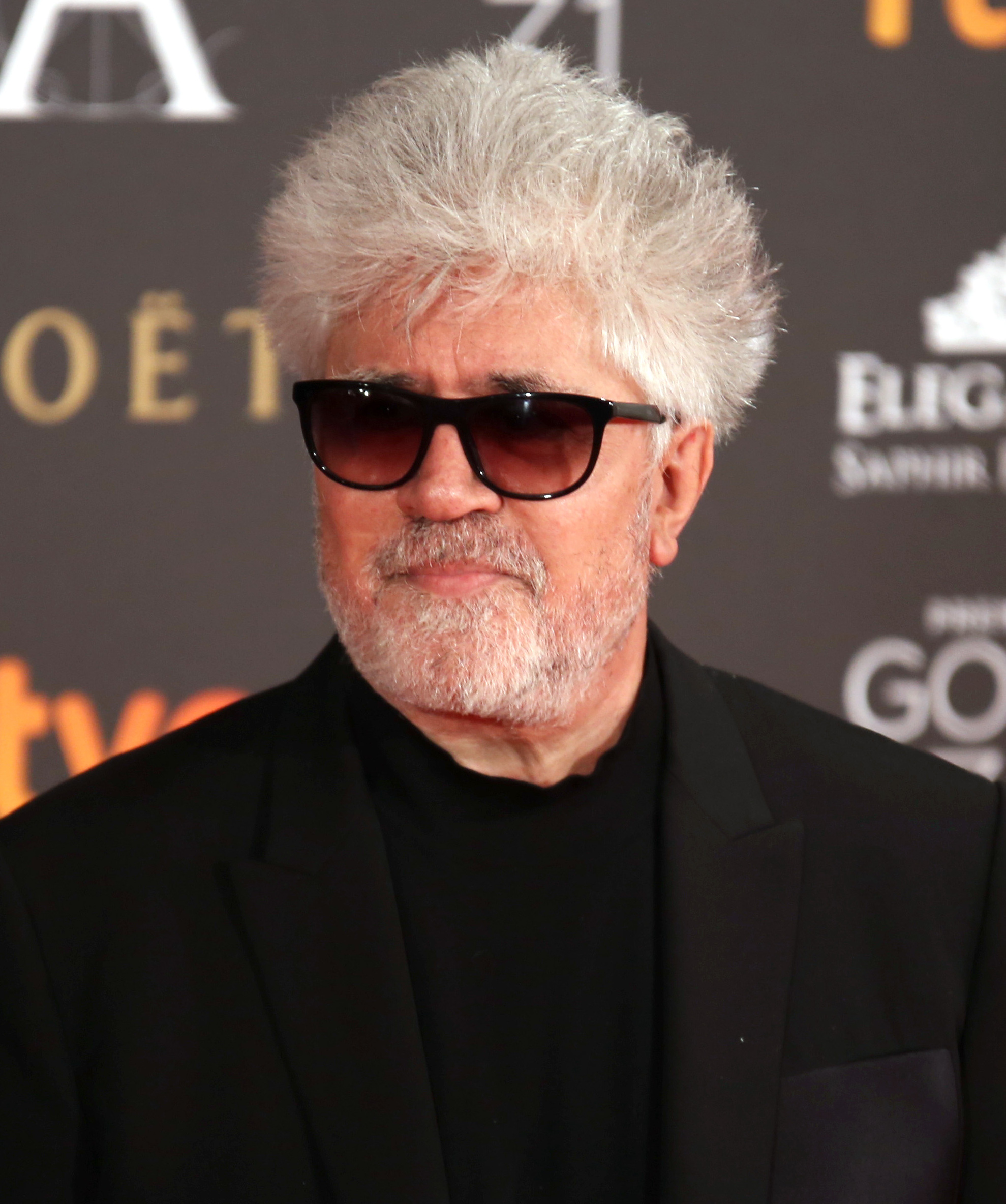 Premios Goya 2017